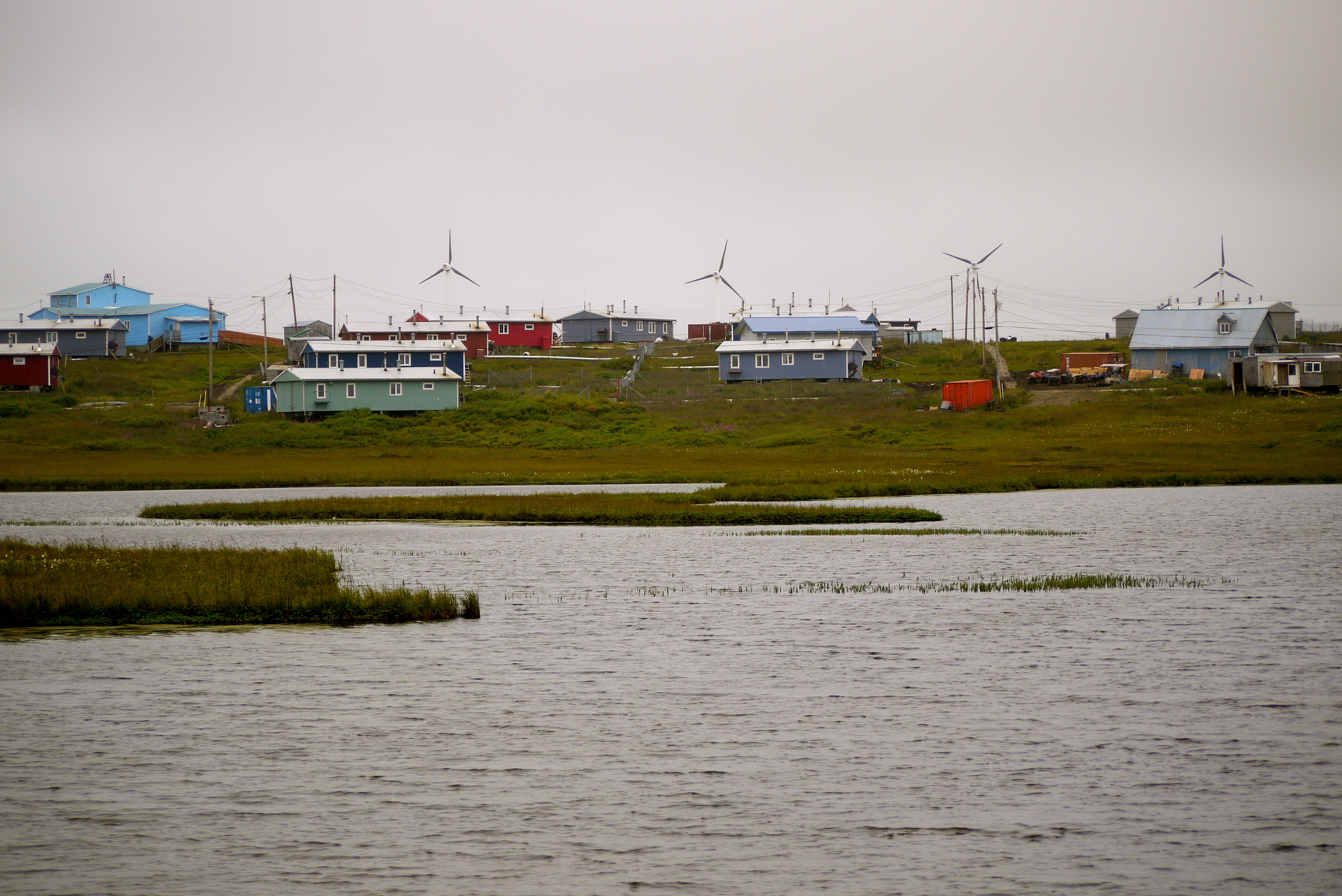 Chevak, Alaska